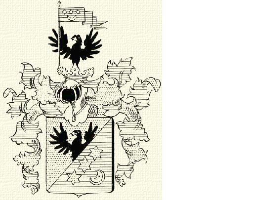 Schulpe Emil, fiai Vilmos és Alfonz címere Ferenc Józseftől